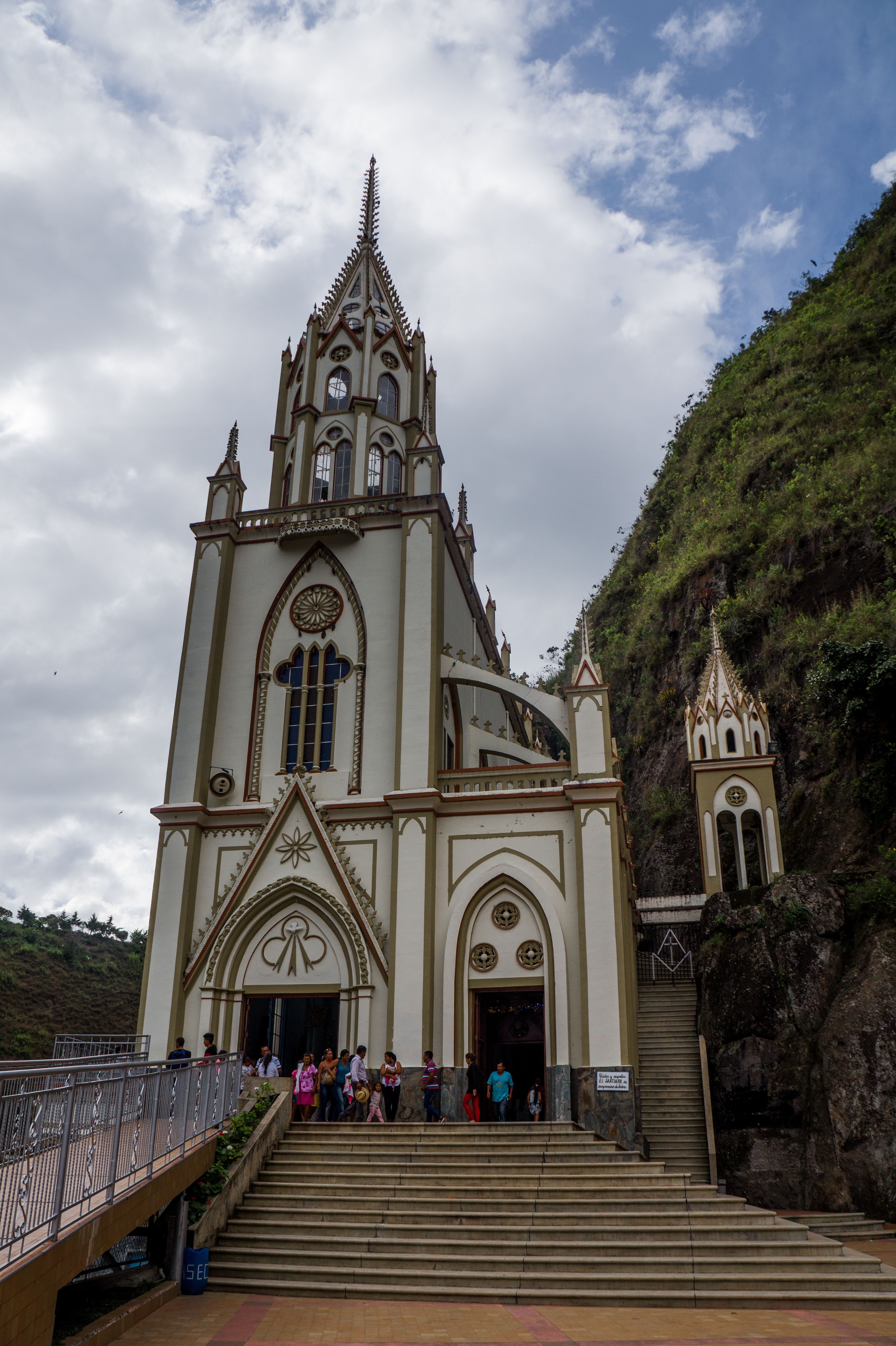 Santuario construido en honor a la virgen de La Playa Esta fotografía fue tomada en el municipio colombiano con código 52693.